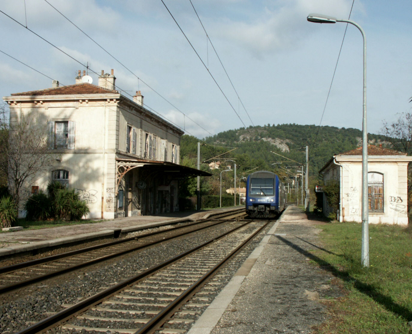 Gare de Gonfaron